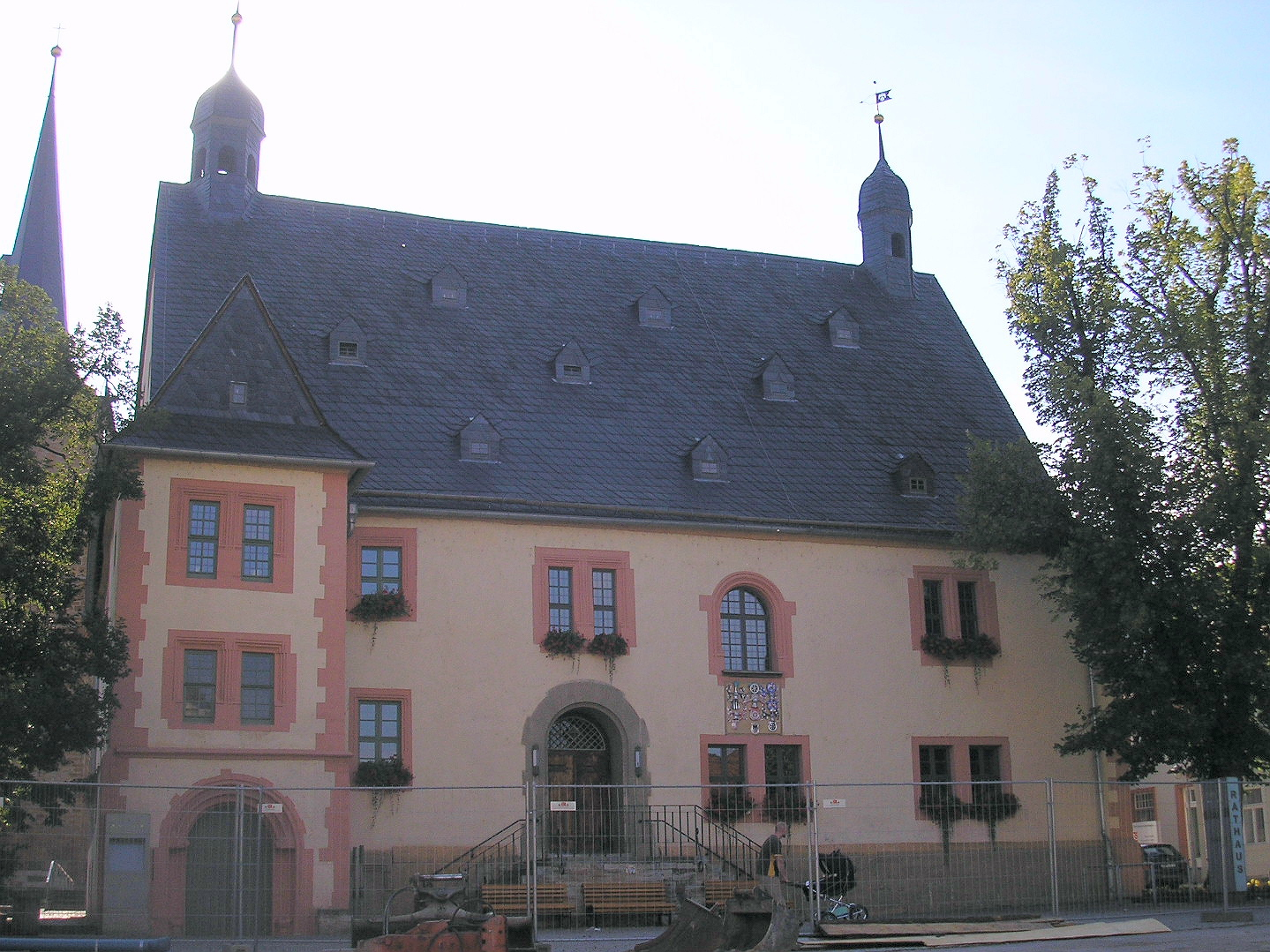 Das Rathaus von Sömmerda (Thüringen).